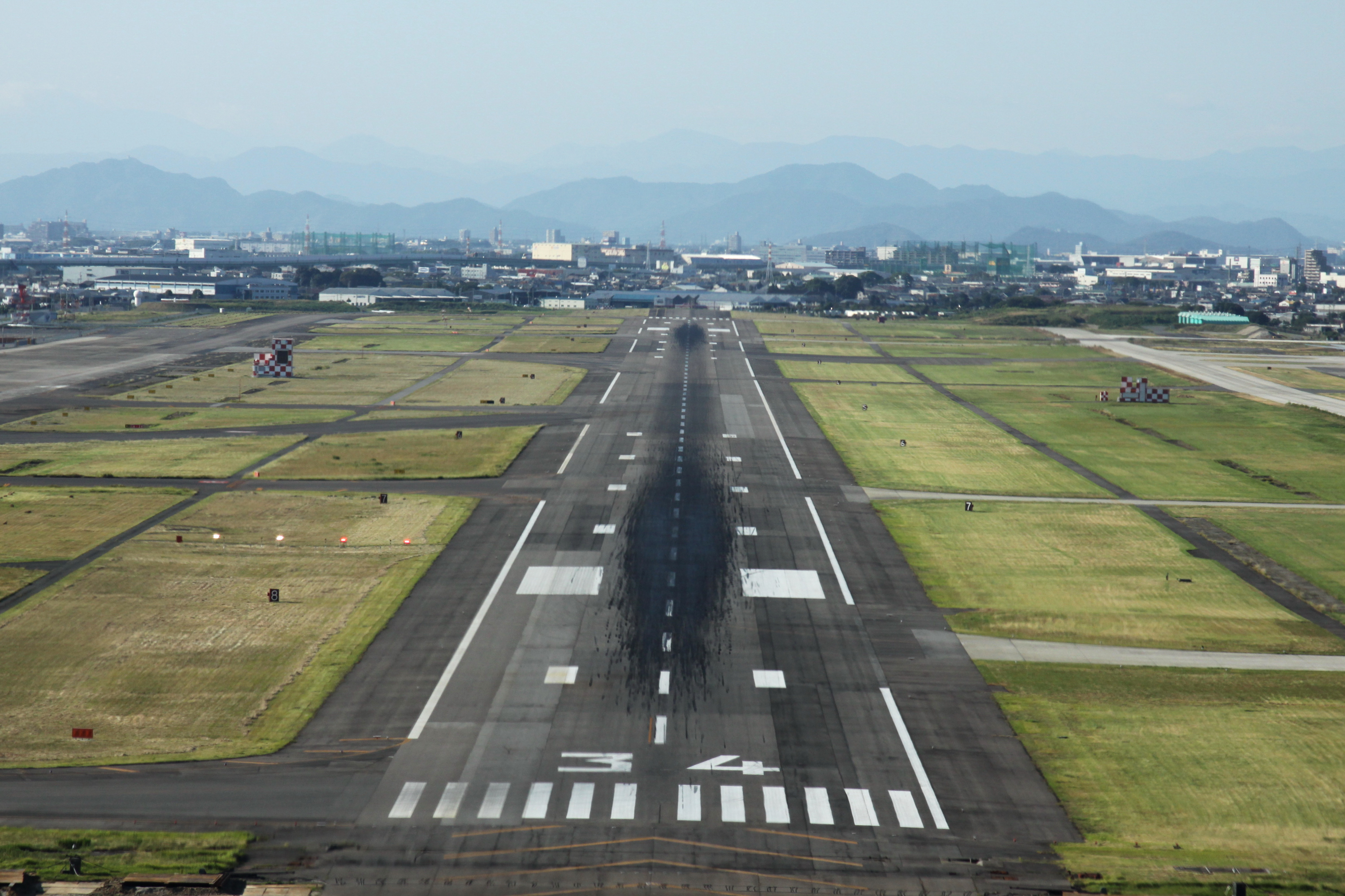 Runway 34, Nagoya Airfield